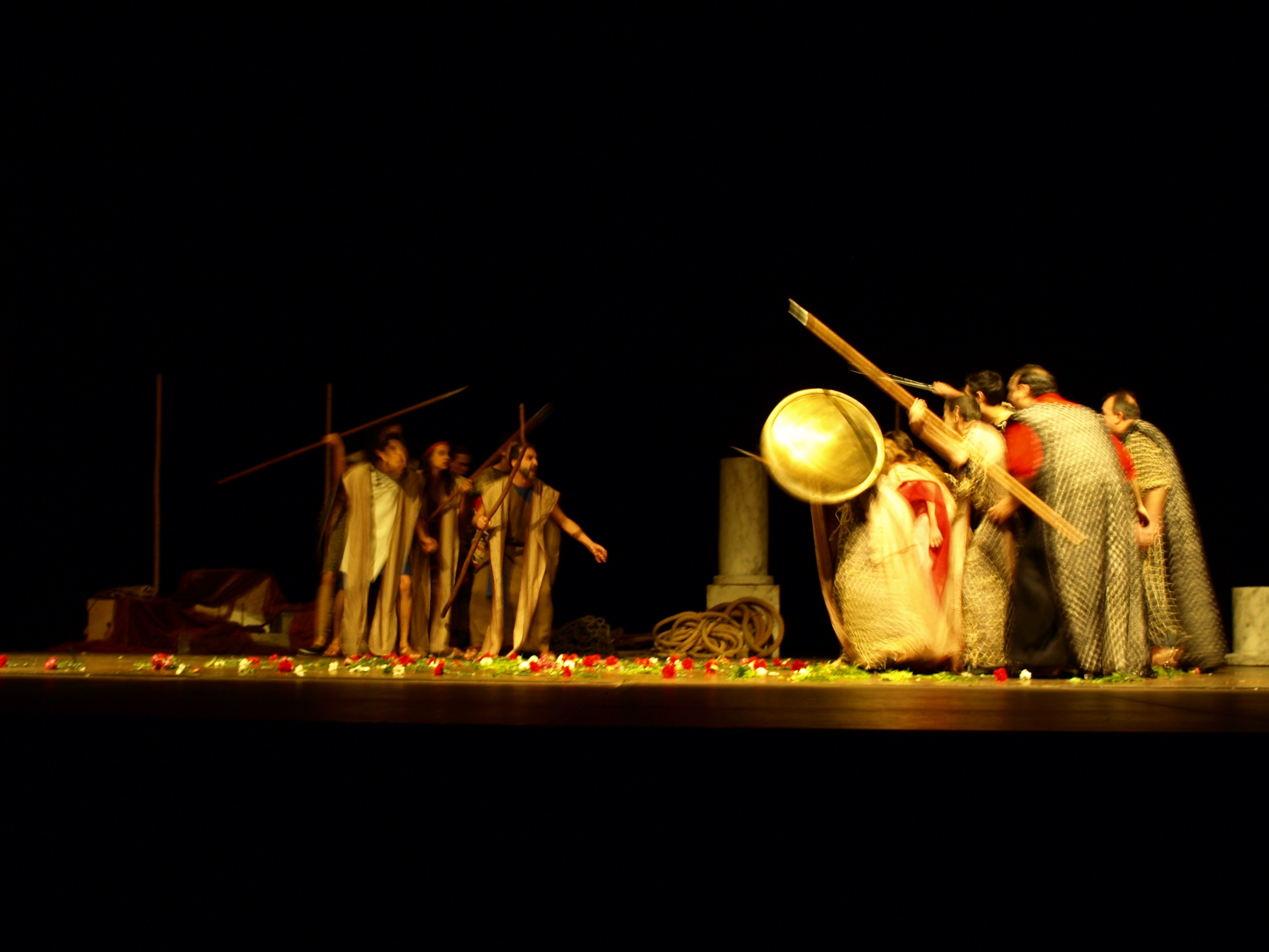 Festival de teatro grecolatino Lugo 2009 10 de marzo de 2009 SeecGalicia